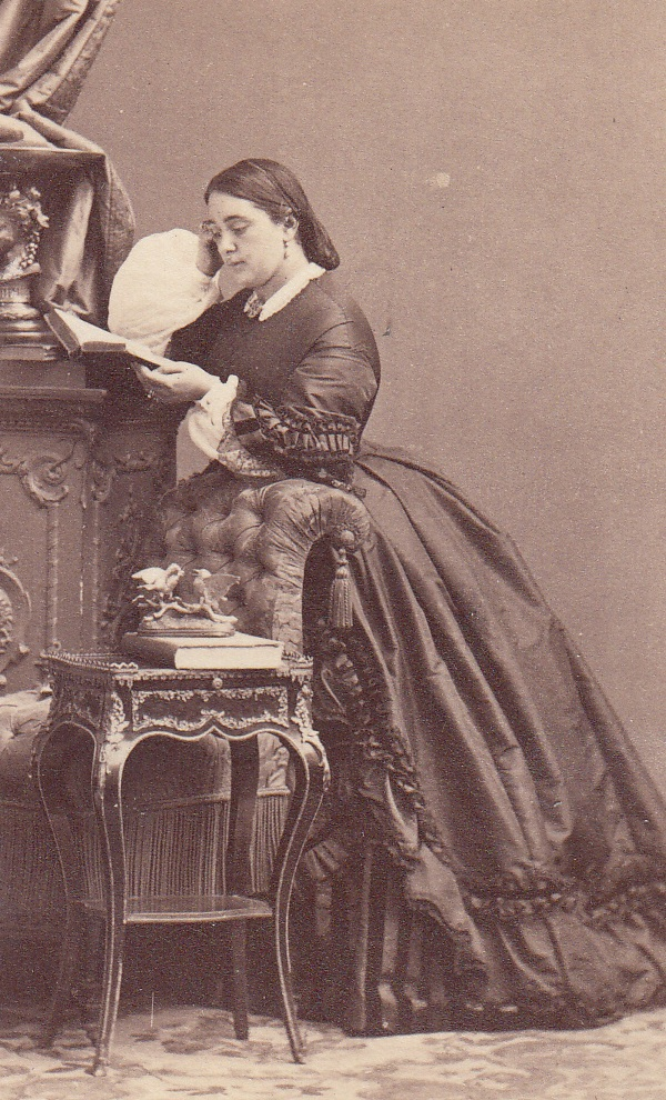 Графиня Ольга Александровна Канкрина, ур. Сталь фон Гольштейн (1836—1889)